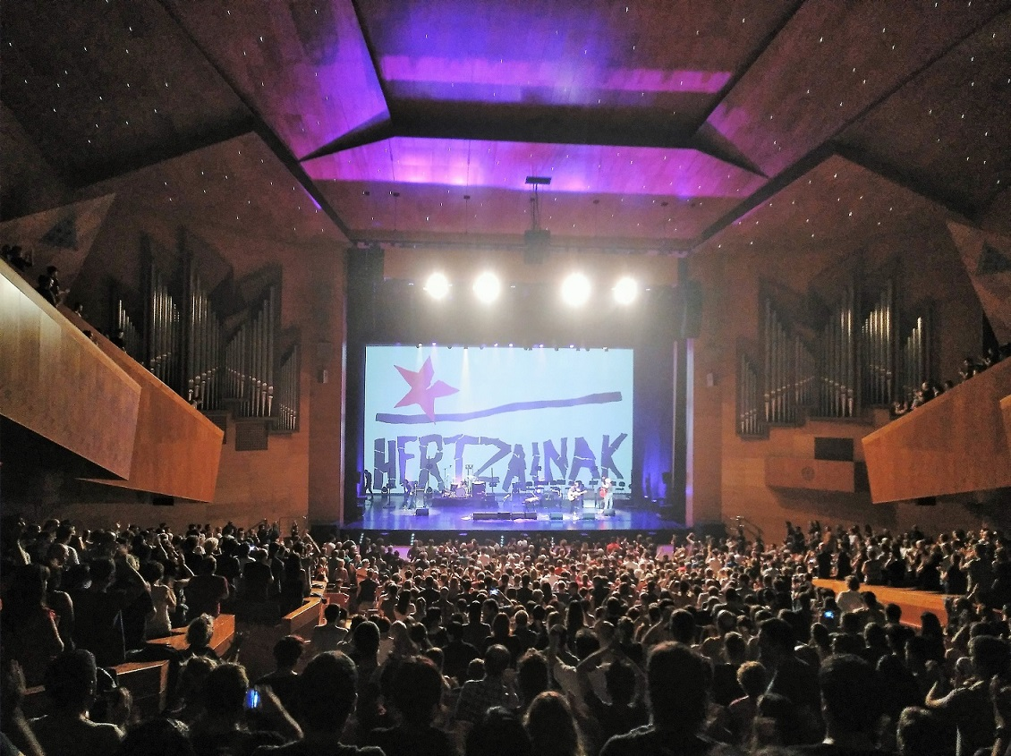 Gari eta Josu Zabalaren kontzertua Euskaldunan, Bilbon, Hertzainak gogoan (Bizkaia)